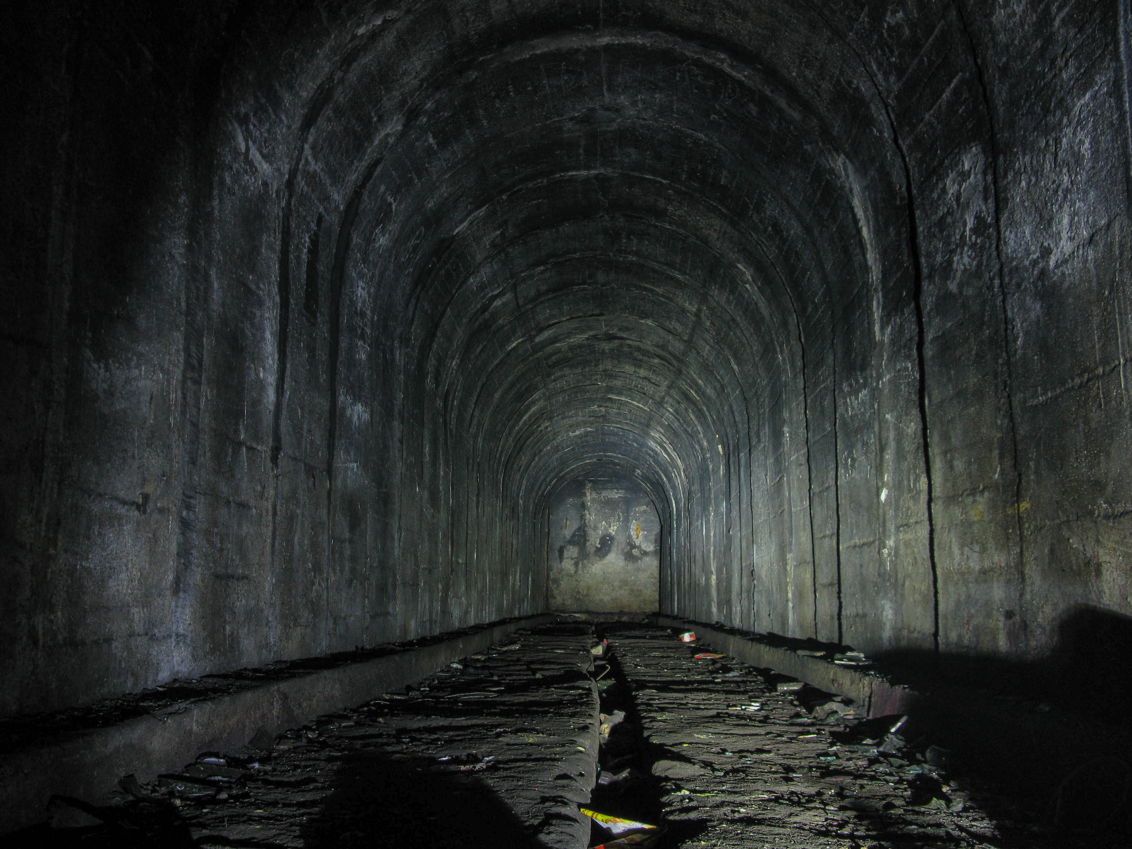 Одно из многих немецких бомбоубежищ Калининграда